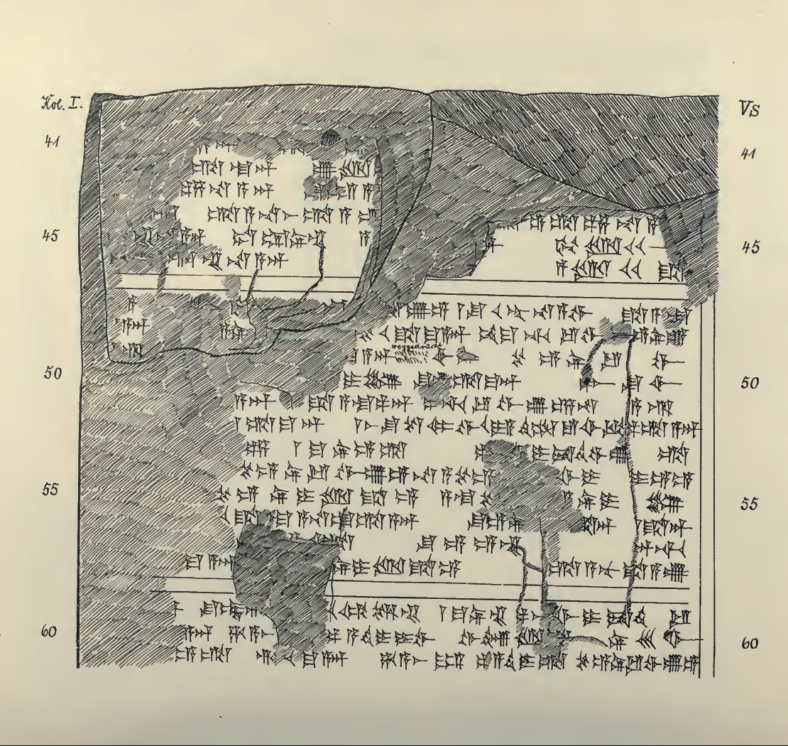 List Tuszratty do Amenhotepa III w języku huryckim – autografia.